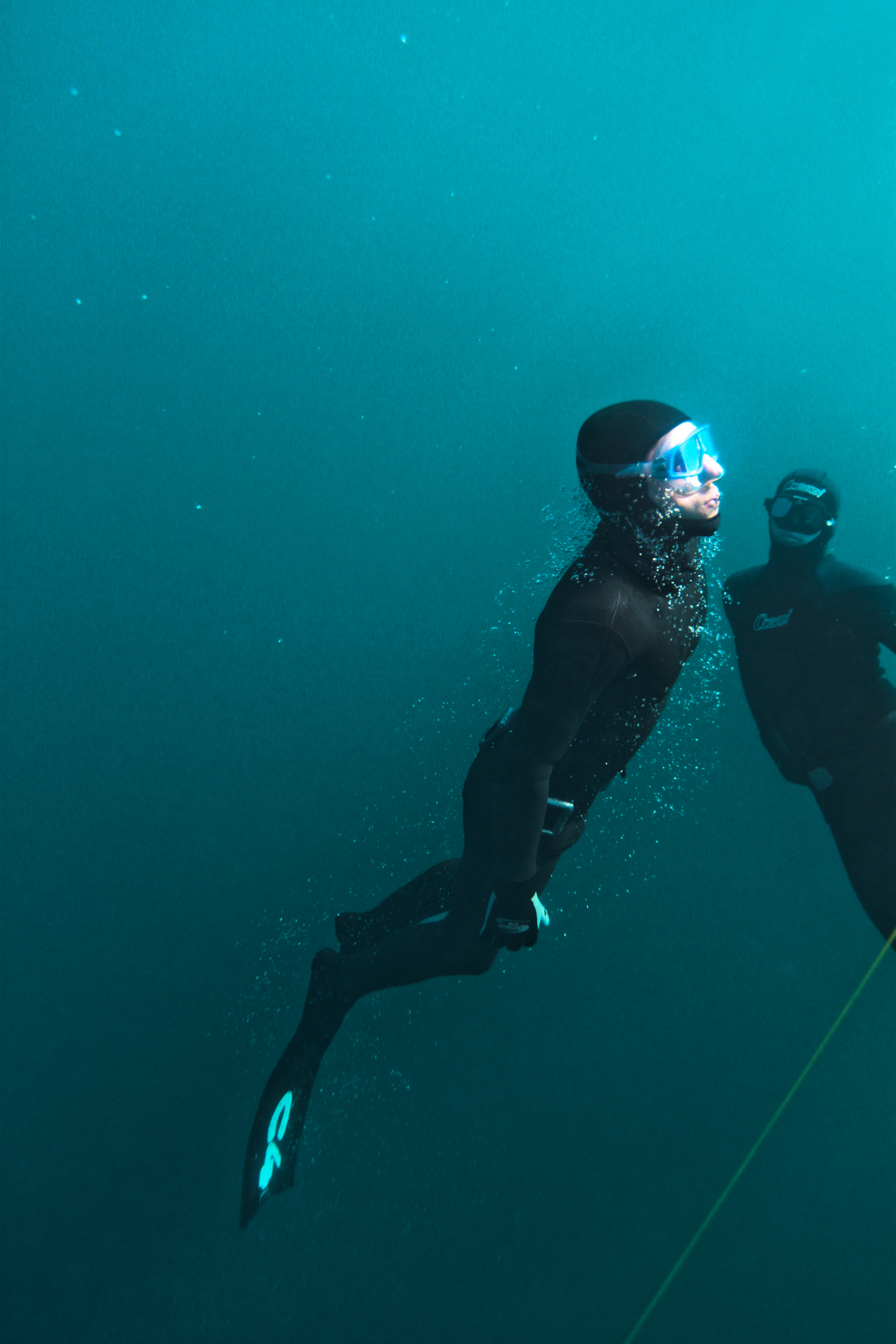 Jonas Krahn beim Trainingstauchen in Griechenland